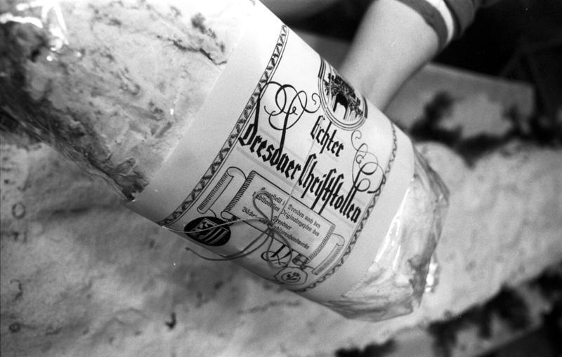 Dresden, Christstollen Herstellung ADN-ZB/Hiekel 5.12.89 Dresden: Weihnachtsstollen "Echten Dresdner Christstollen", gebacken nach streng gehütetem Originalrezept, gibt es nur bei Bäckermeister Karl Knittel. In der vorweihnachtlichen Saison sind es wieder mehrere tausend der 2, 3- und 4-Pfünder, die das Geschäft verlassen.